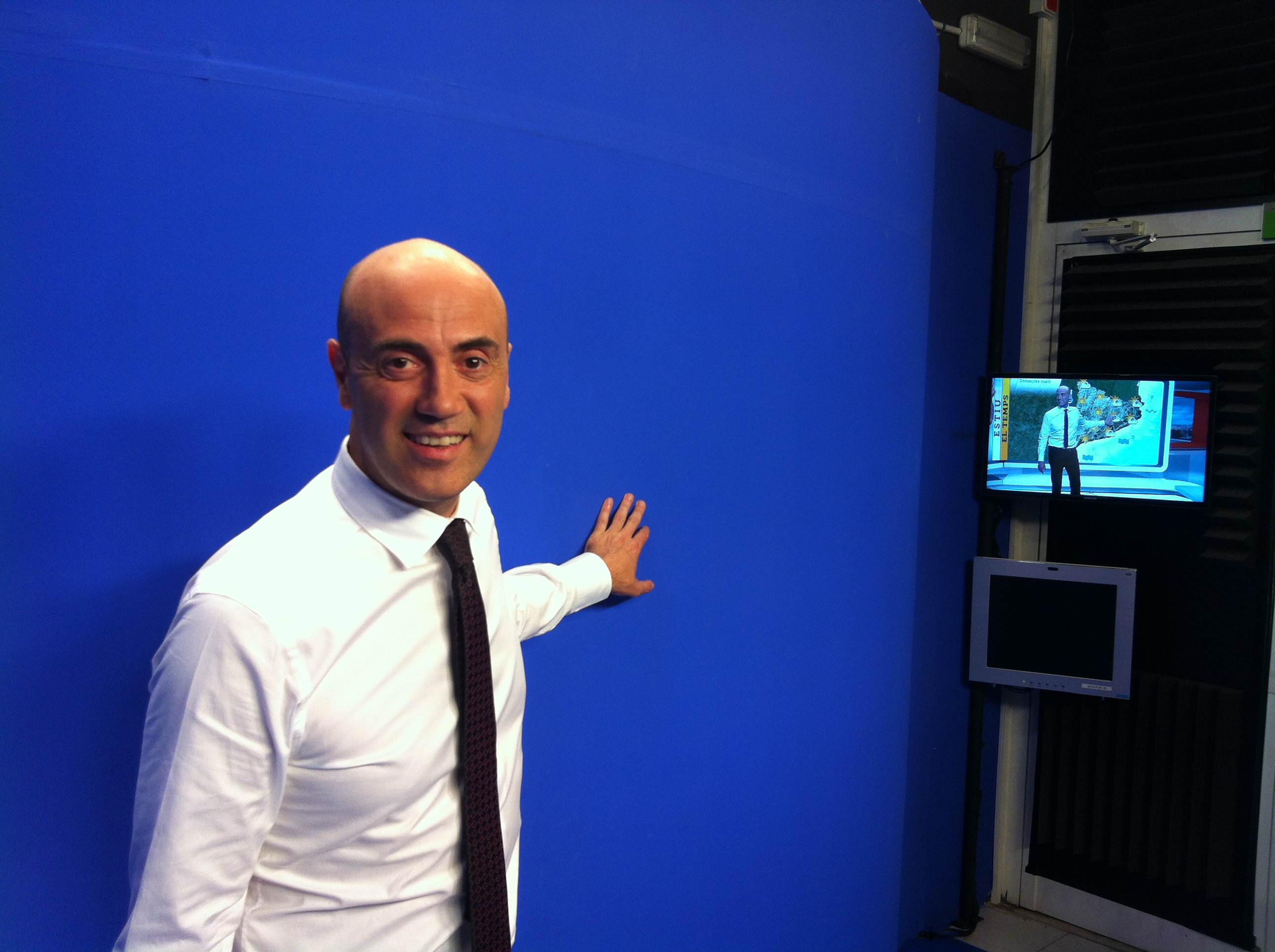 Tomàs Molina i Bosch